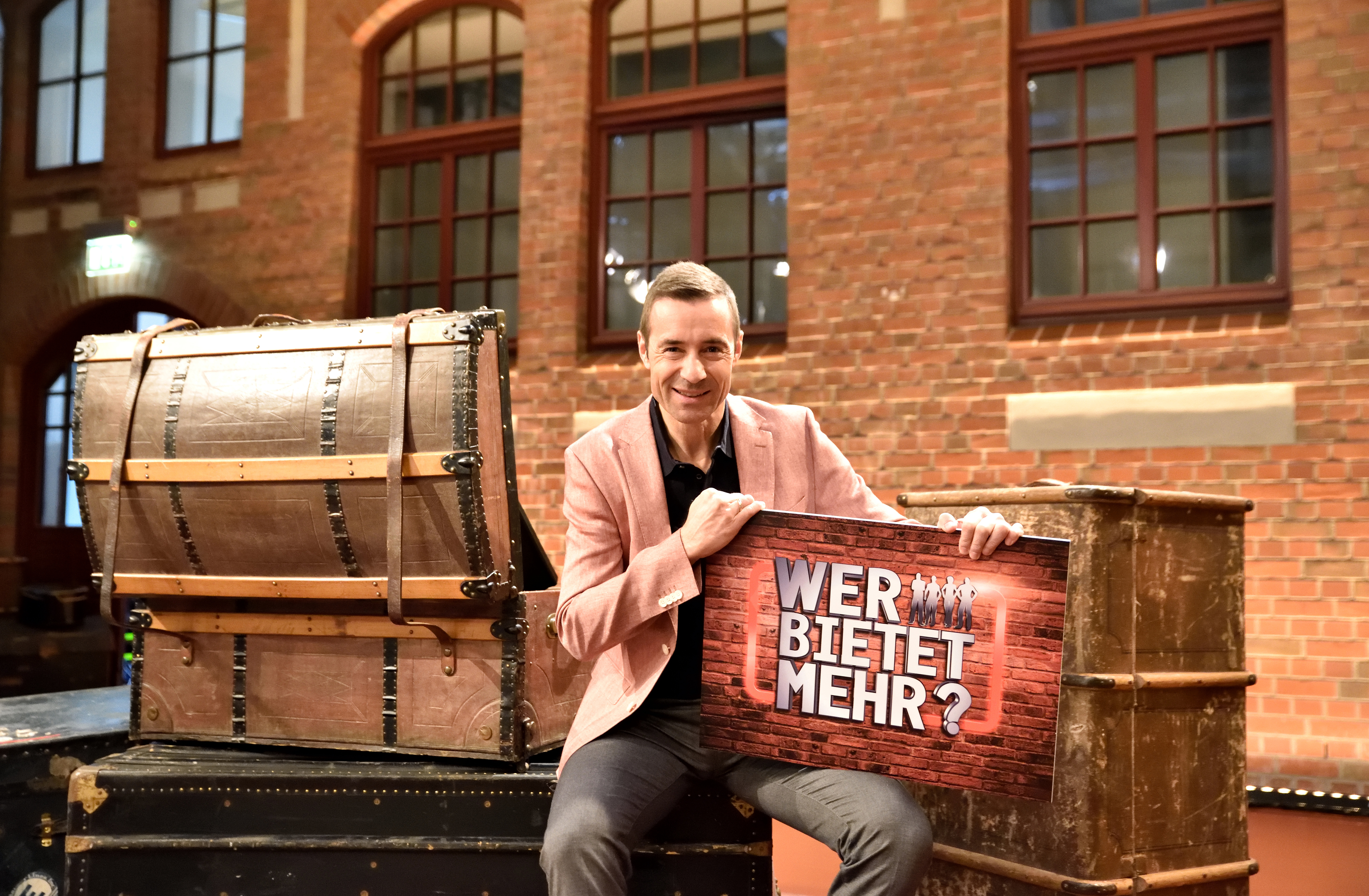 Kai Pflaume beim Fototermin zur Show Wer bietet mehr? im Auswandermuseum Hamburg